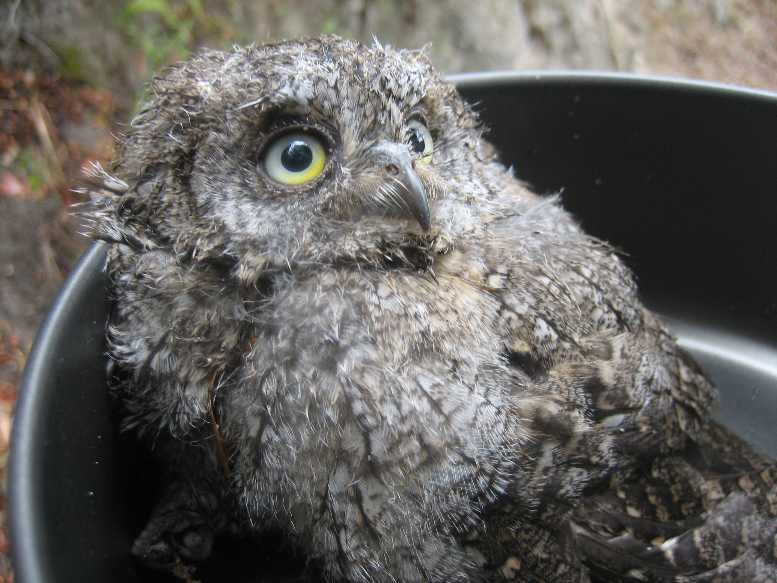 Hibou Petit-Duc (Otus scops) retrouvé en Corse au pied de son nid, et remis en hauteur, hors de portée des chats.